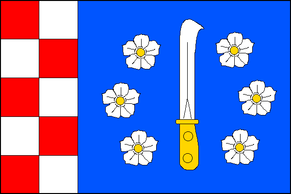 vlajka, Kuchařovice, okres Znojmo